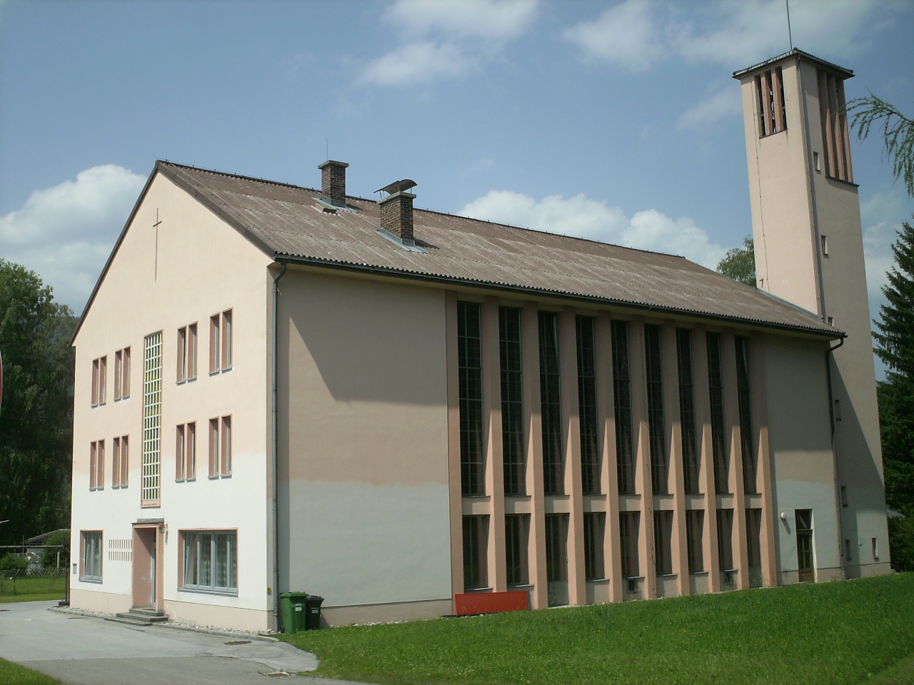 Kath. Pfarrkirche Zum gekreuzigten Erlöser in Mürzzuschlag-Hönigsberg/Österreich.